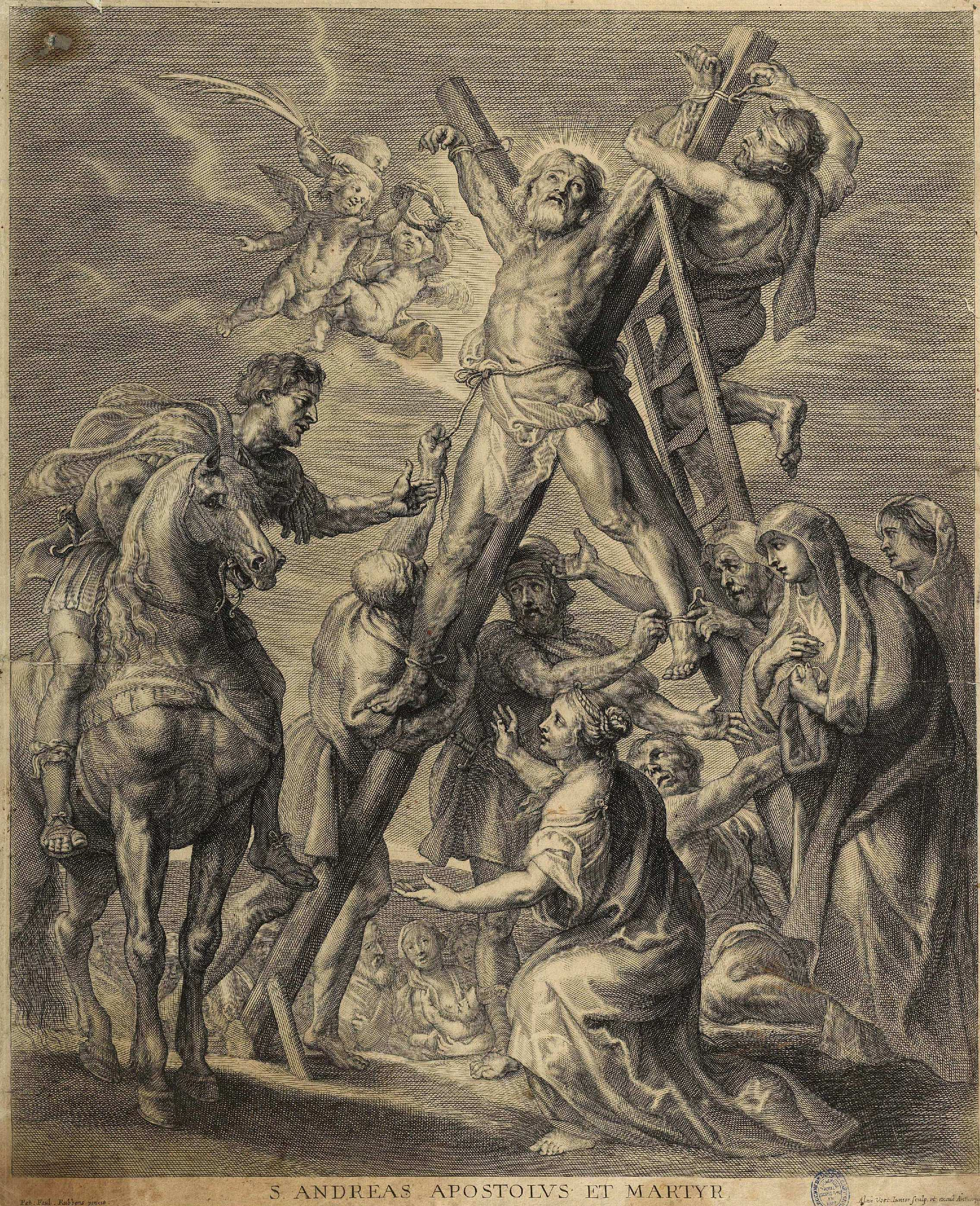 La crucifixión de San Andrés, grabado a buril firmado "Pet. Paul Rubbens pinxit; Alex Voet Iunior sculp et excud. Antuerpiae". Inscripción "S. Andreas apostolus et martyr". Estampa basada en el Martirio de San Andrés de Rubens conservado en la Fundación Carlos de Amberes de Madrid, antiguo Hospital de San Andrés de los Flamencos